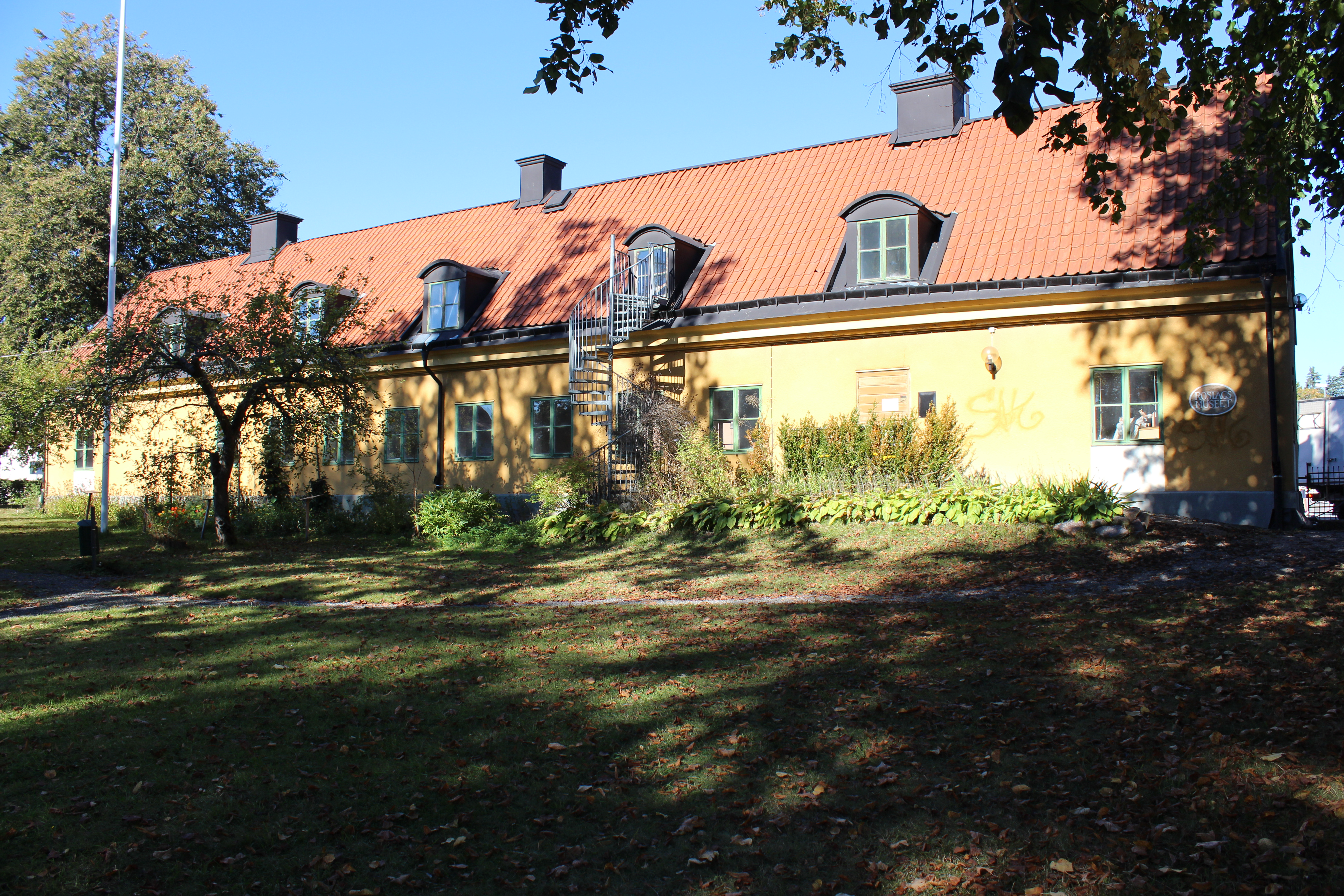 Gevärsfaktoriet (Norrtelje Gevärsfactorie), sedermera Roslagsmuseet (Roslagens museum), Norrtälje